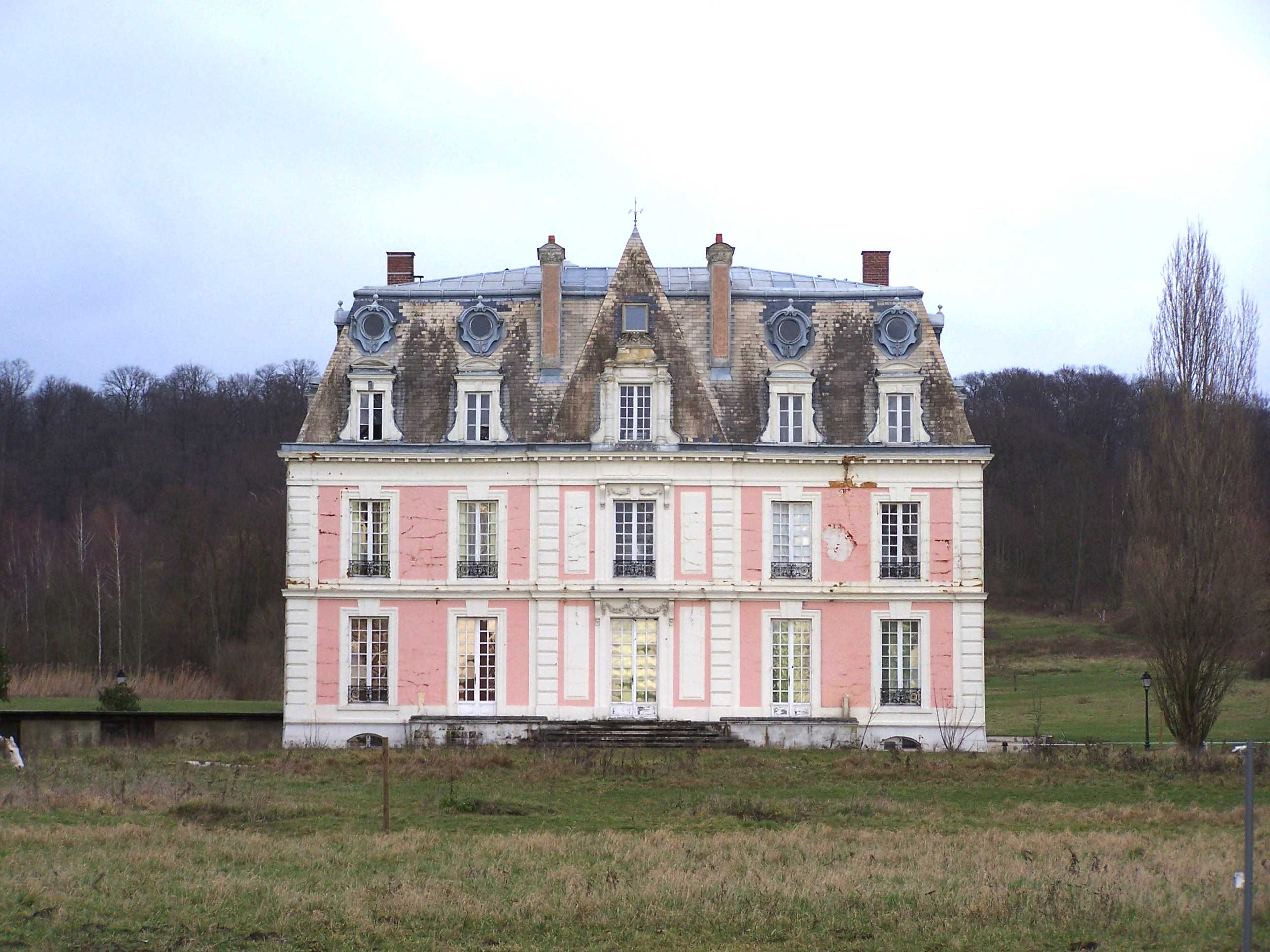 Château de Boulémont à Herbeville (Yvelines, France)